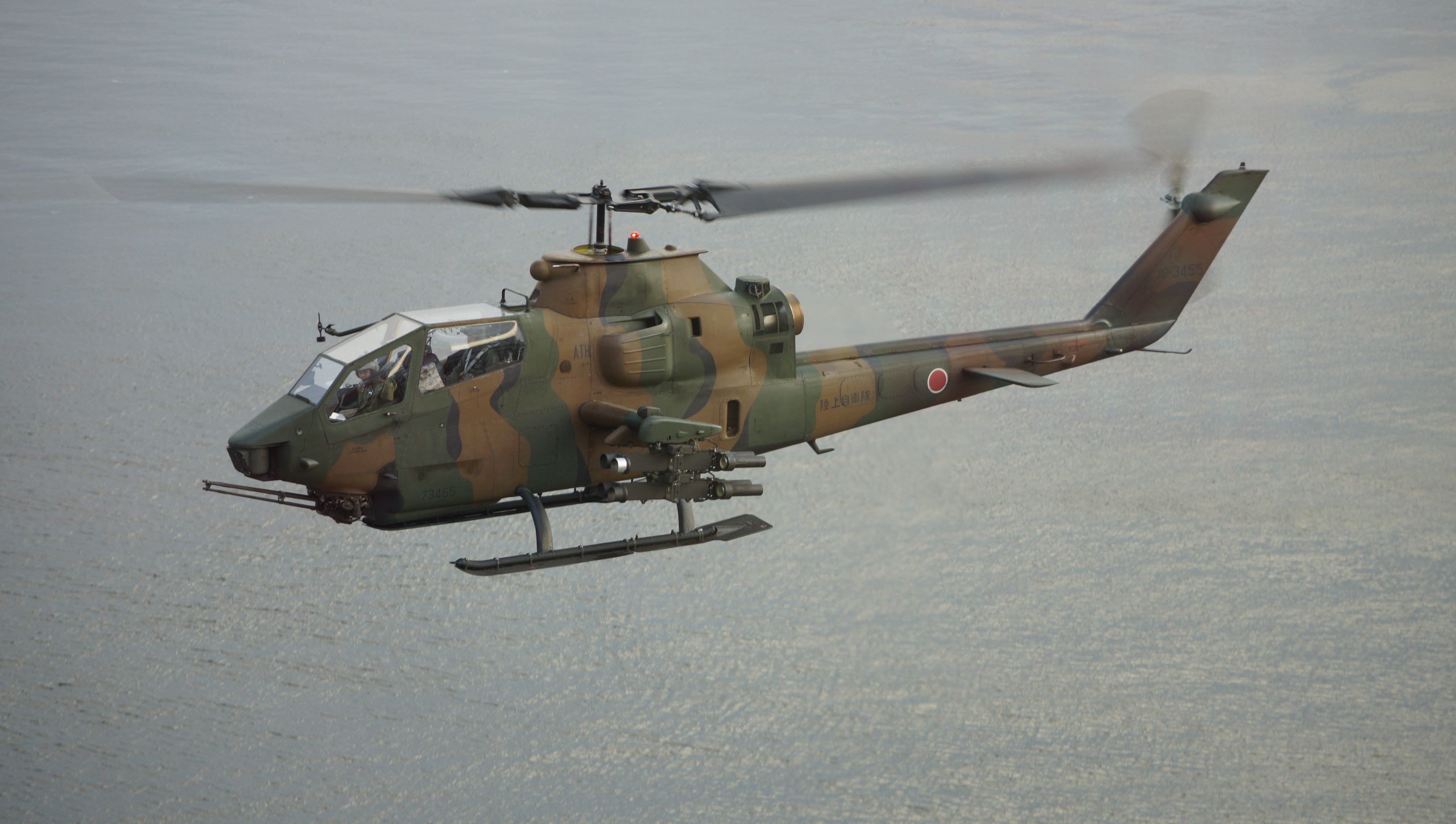 陸上自衛隊 離陸するAH-1S対戦車ヘリコプター（73455号機）。2013年3月10日 OSAKA防衛・防災フェスティバルが開催されたアジア太平洋トレードセンターにて。